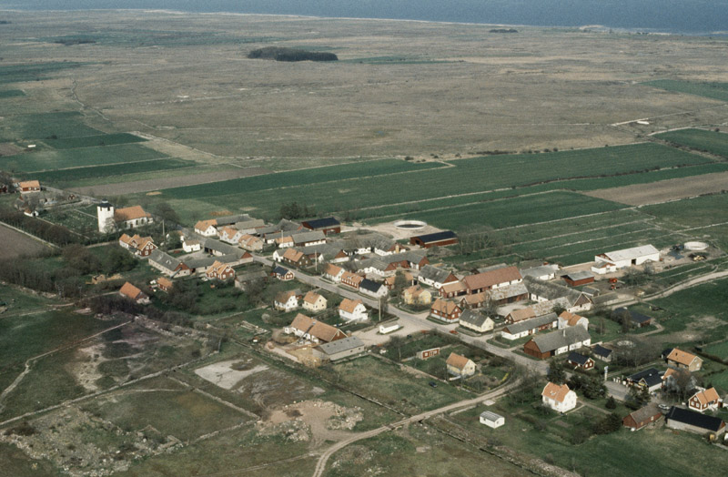 Hulterstads kyrka. Bilden är tagen mot (väderstreck): NO Motiv: Hulterstad Nyckelord: Flygbilder, Riksintressen, Världsarv Kategori: Kyrkby, Slättbygd Hulterstads kyrka. Bilden är tagen mot (väderstreck): NO.